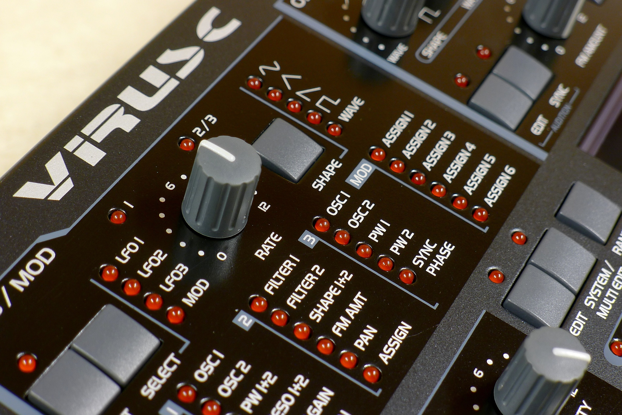 Access Virus C Desktop